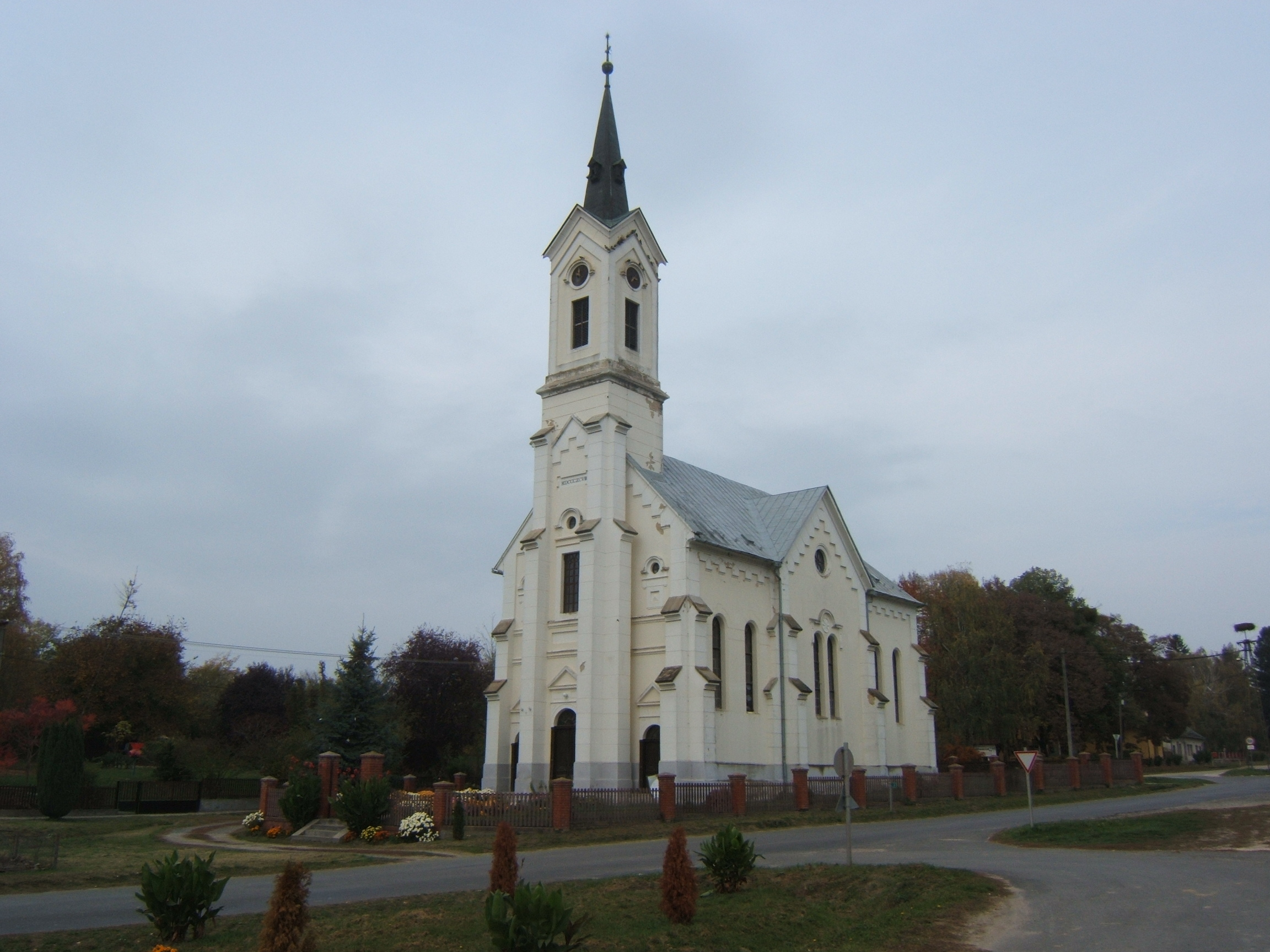 Hedrehely, templom